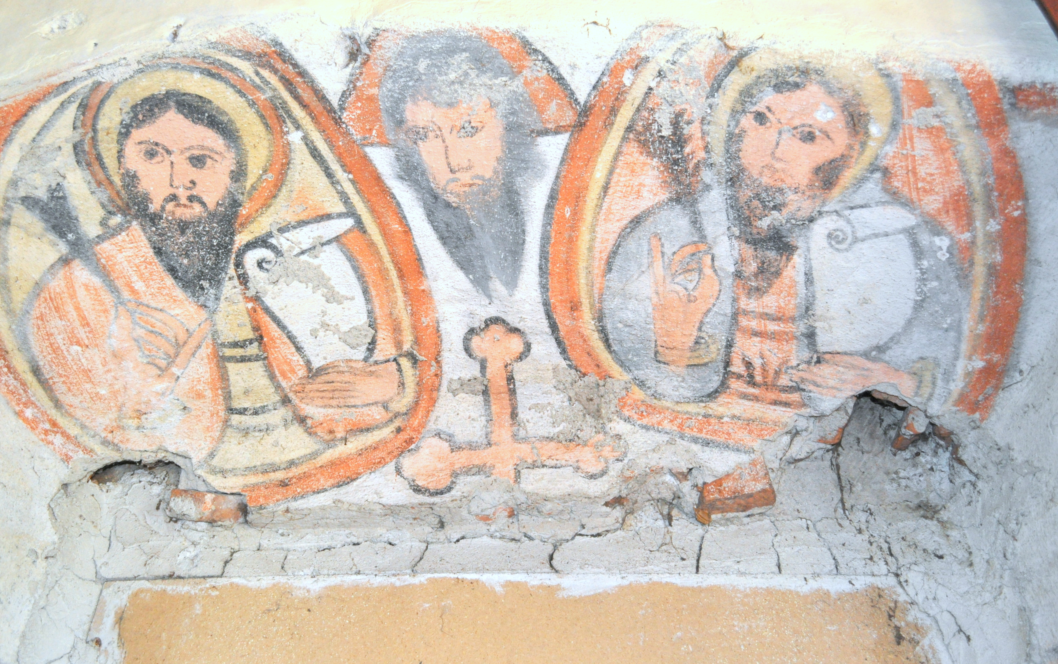 Biserica "Sf. Mare Mucenic Gheorghe", sat SÂNPETRU; comuna SÂNTĂMĂRIA-ORLEA